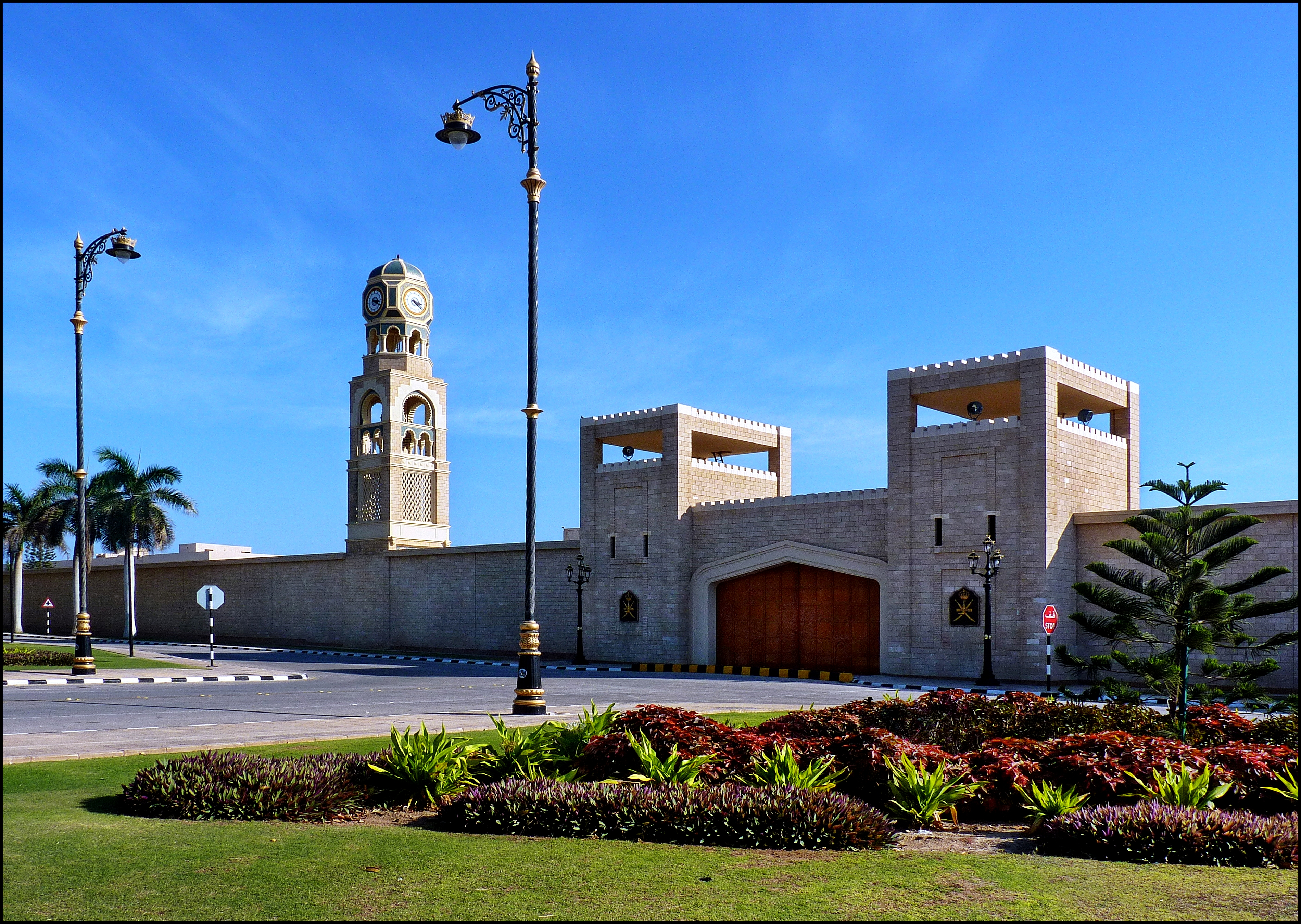 As Sultan Qaboos Street, Salalah